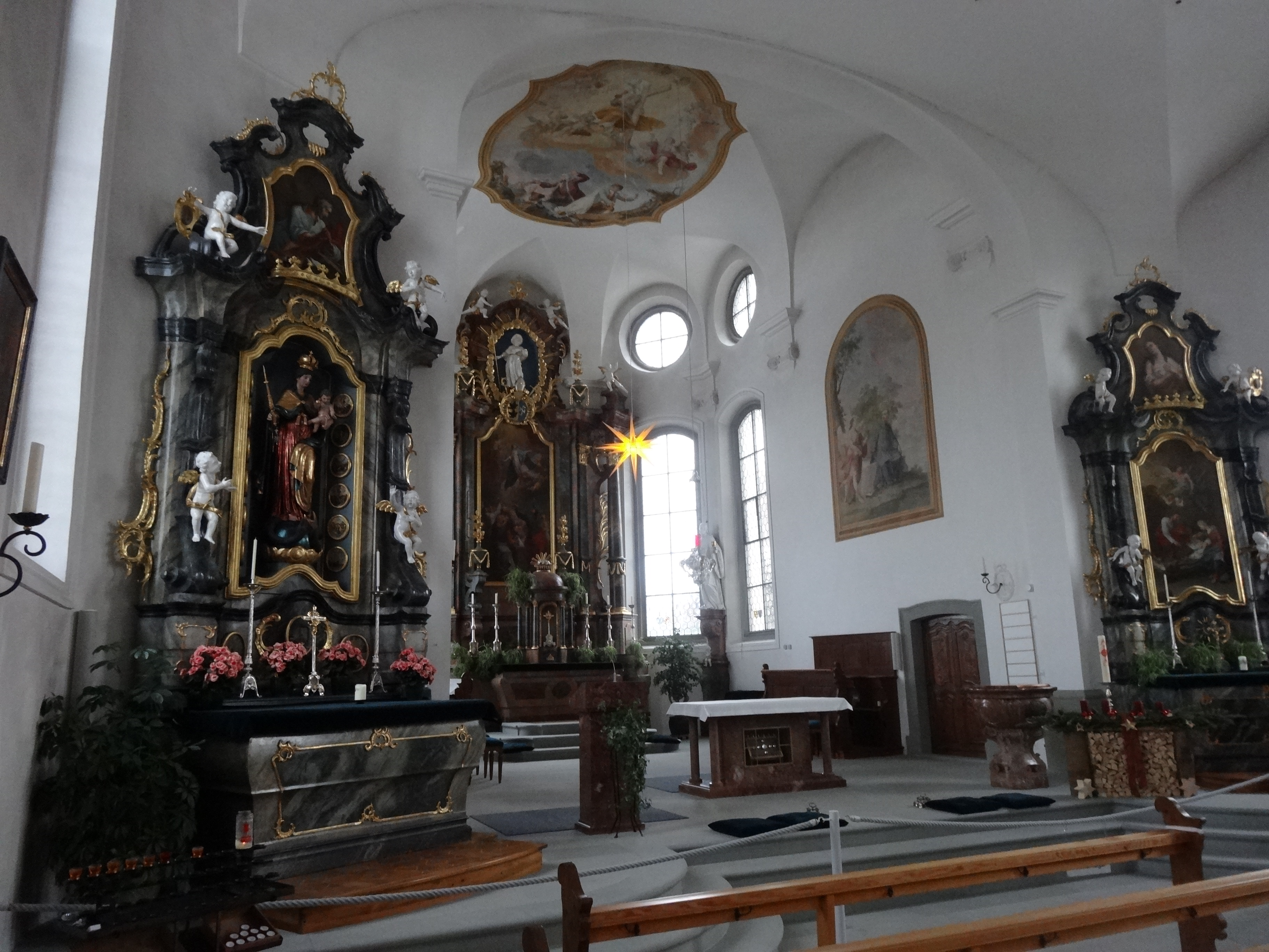 Kath. Pfarrkirche St. Jakobus in Feusisberg (Altarzone)